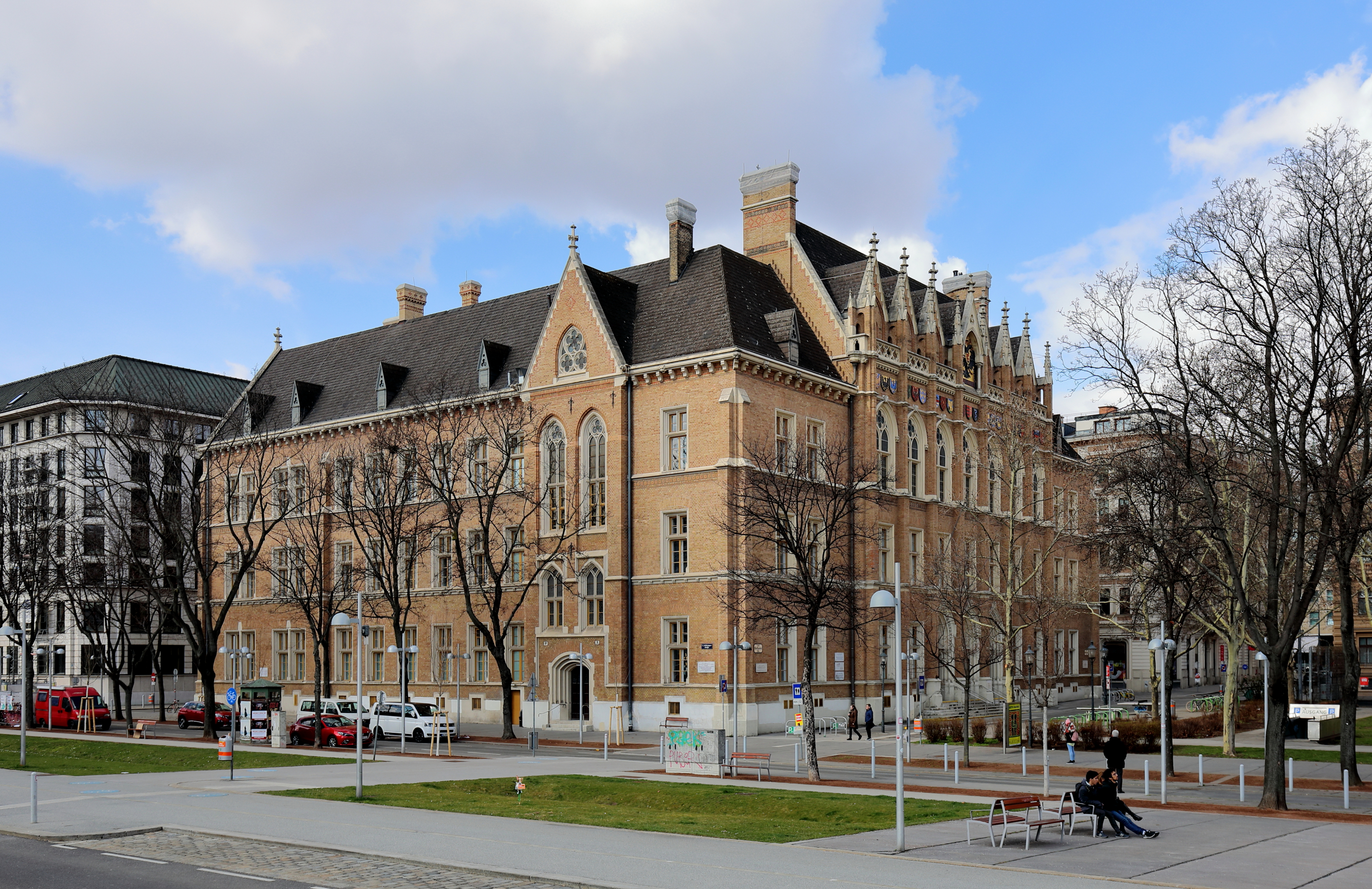 Ostansicht des Akademischen Gymnasiums am Beethovenplatz im 1. Wiener Gemeindebezirk Innere Stadt. Das dreigeschossige neugotische Schulgebäude wurde von 1863 bis 1866 nach Plänen des Architekten Friedrich von Schmidt errichtet.